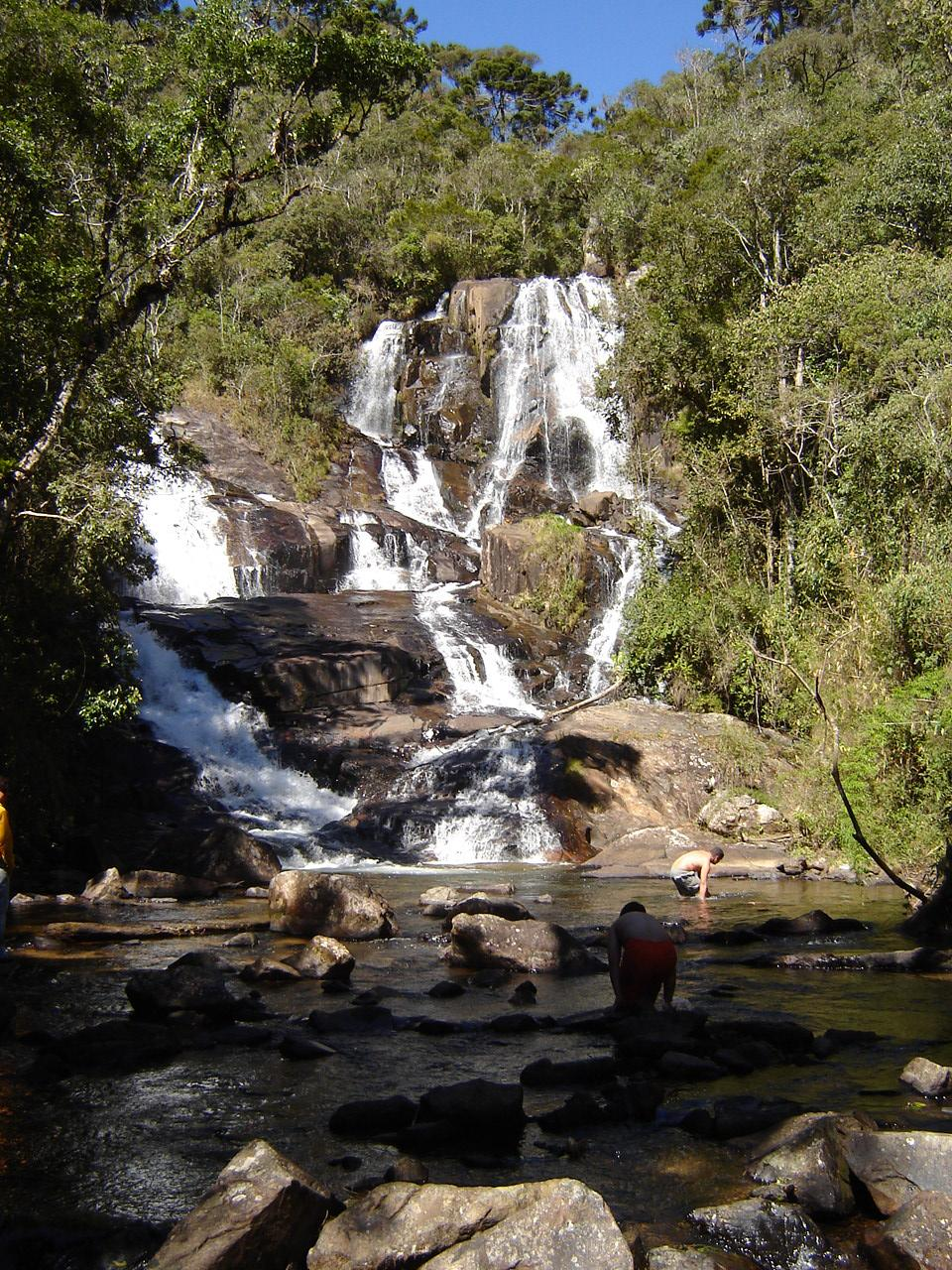 Cachoeira do Itagybá no município de Delfim Moreira